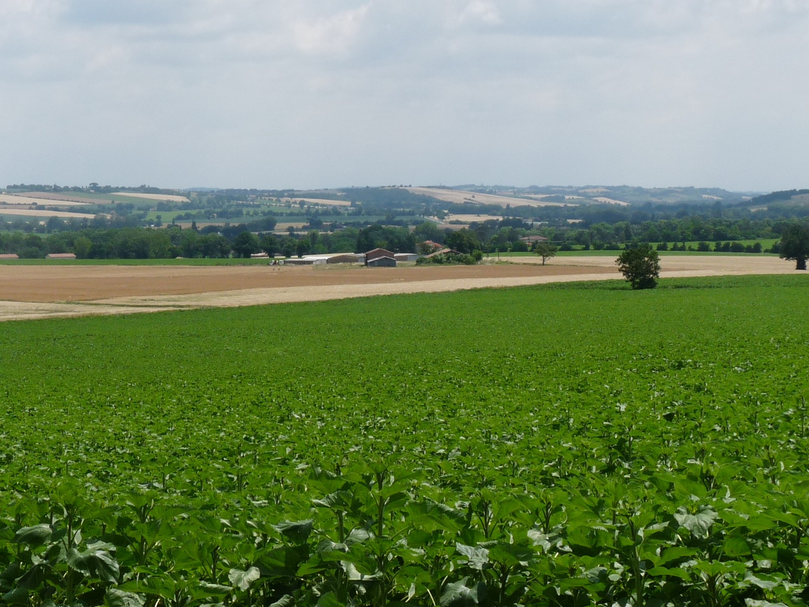 Vue vers le nord-est depuis le bourg de Francarville, Haute-Garonne, France